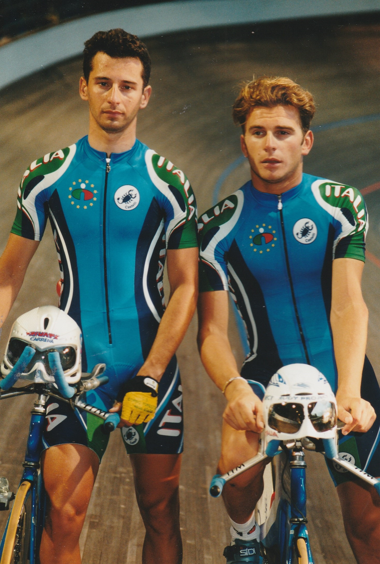 Mario Benetton (l.), Cristiano Citton bei der Radsportveranstaltung "Die Freitag Nacht"